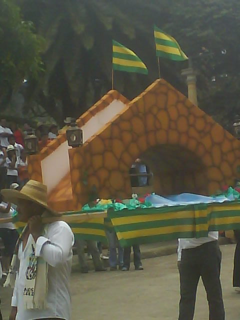 FERIAS Y FIESTAS PUENTE NACIONAL , SANTANDER, COLOMBIA